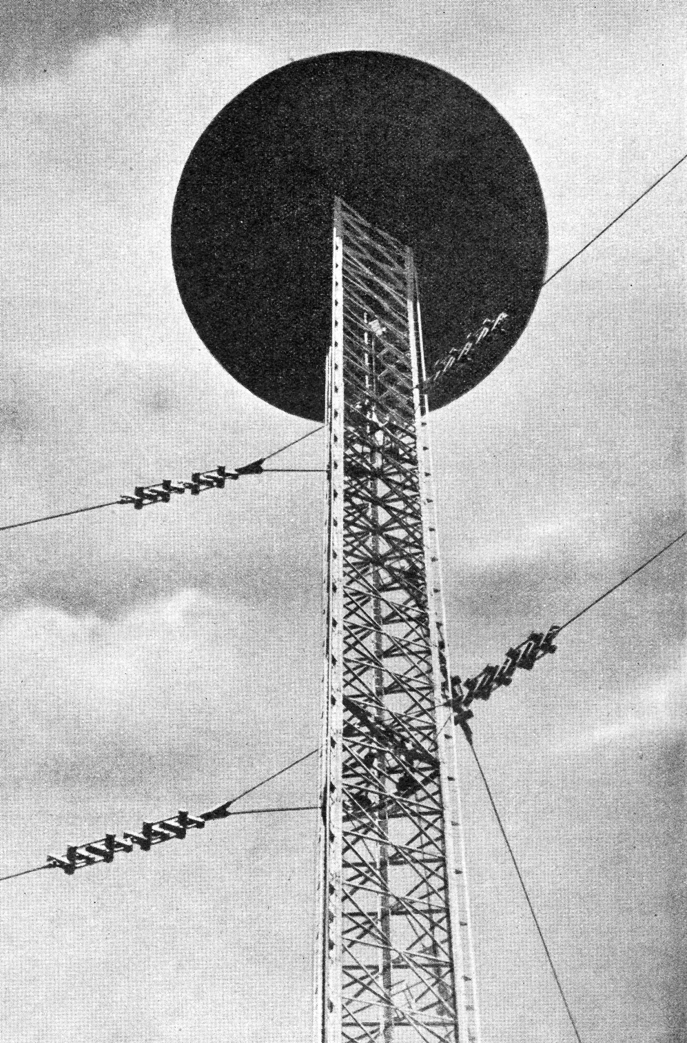 Deutschlandsender III in Herzberg/Elster